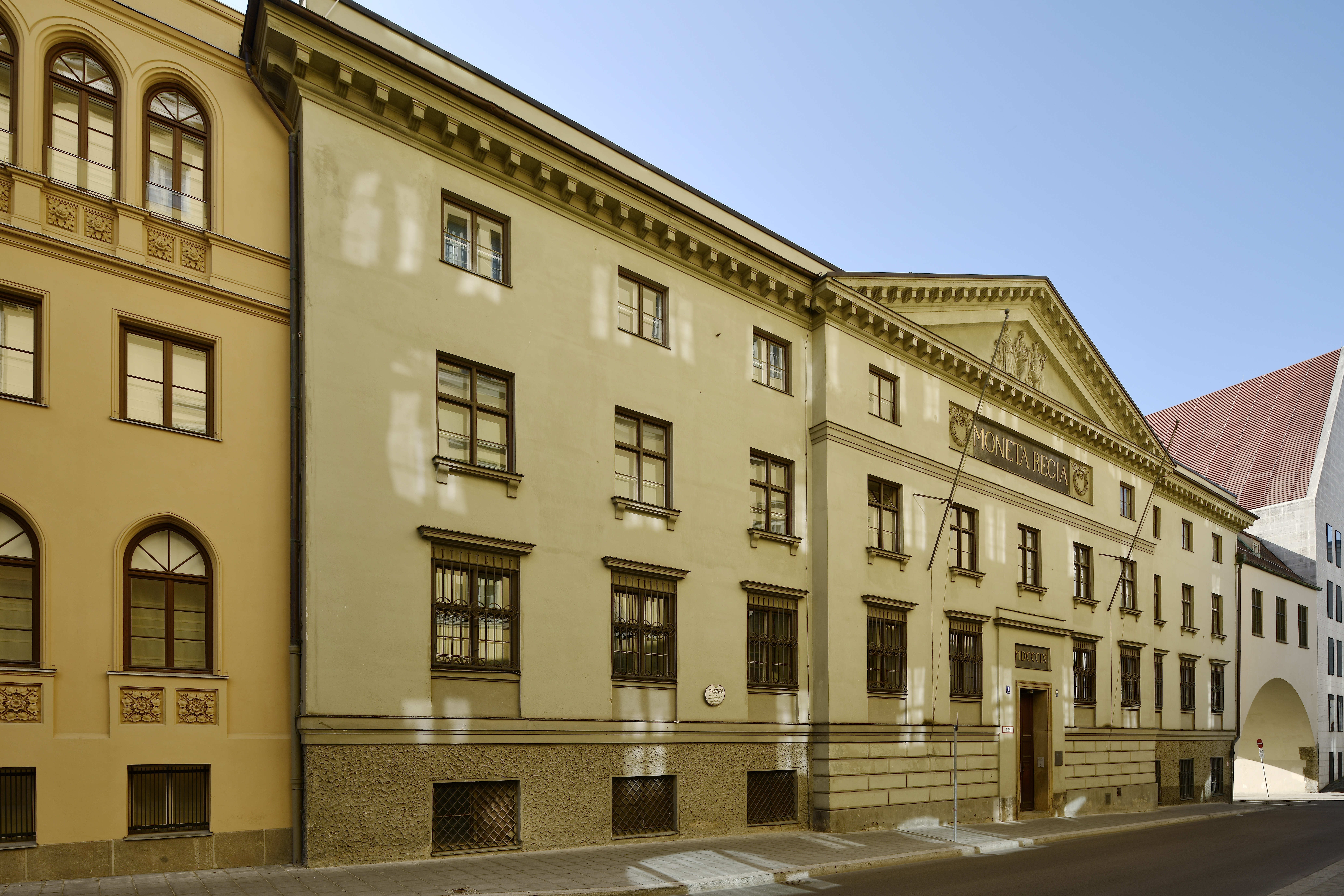 München, Fassadenansicht Hofgraben 4. Alte Münze. Bayer. Landesamt für Denkmalpflege.